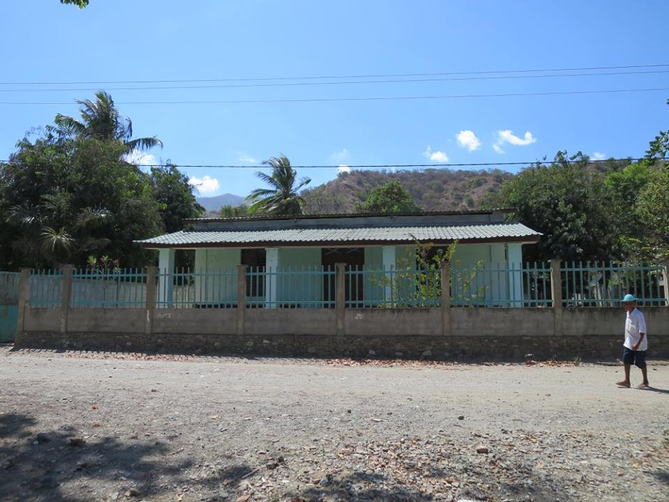 Antiga Escola Primaria de Laclo - Tempo Portugues